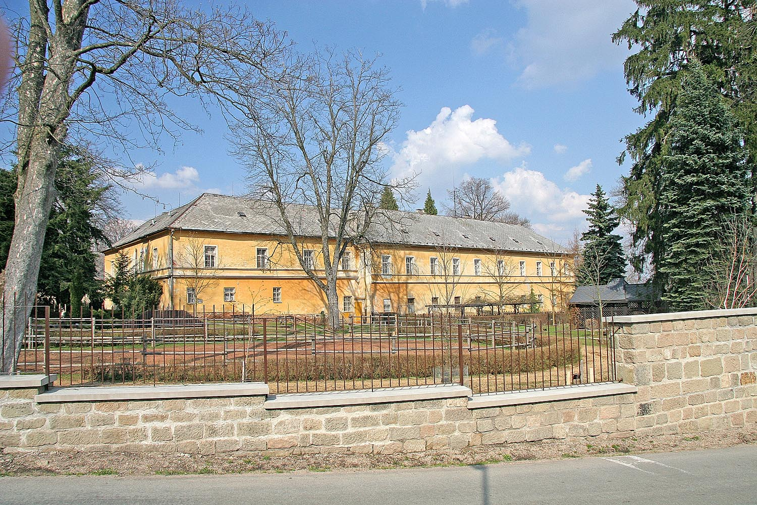 zámek v obci Žampach, district Ústí nad Orlicí autor: Prazak date: 20. 4. 2006